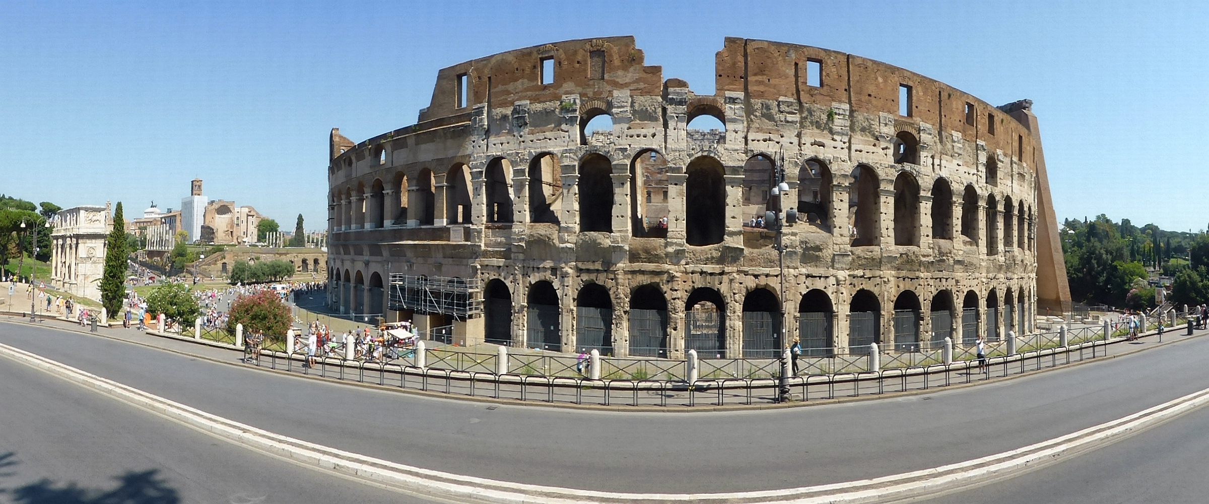 Kolosseum Rom an der Via Celio Vibenna - Südseite mit starkem Restaurationsbedarf - links Konstantinsbogen, halblinks dahinter ist das Forum Romanum gelegen. Arco di Constantino et Colosseum Sud Roma Italia Foto Wolfgang Pehlemann P1070651